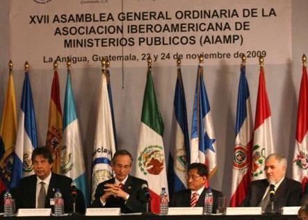 Acto de inauguración de la Asamblea de la Asociación Iberoamericana de Ministerios Públicos en el Centro de Formación de la Cooperación Española en La Antigua Guatemala, con el Presidente de la República, Alvaro Colon.